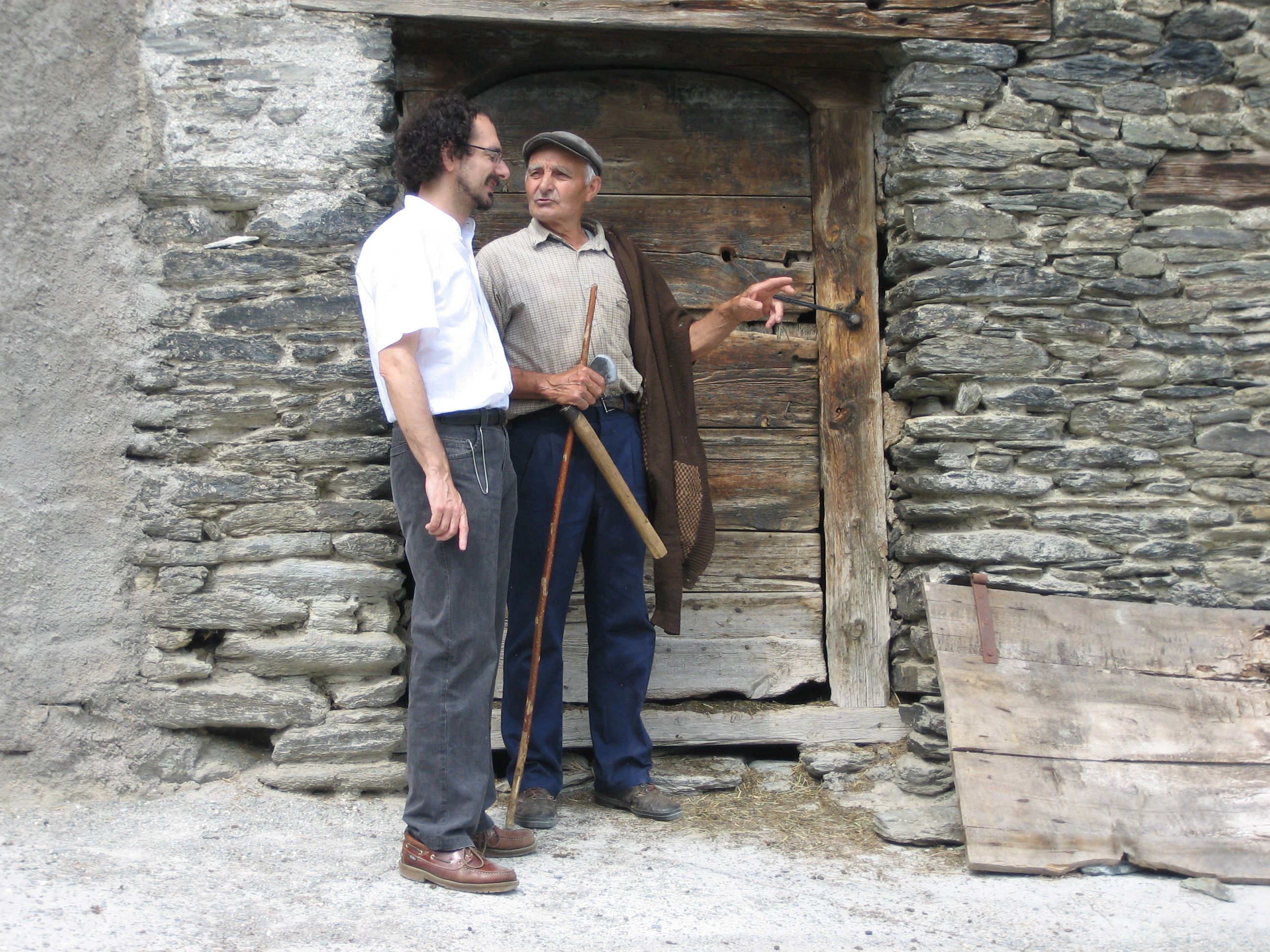 Jaume Ayats conversant amb Joan Ros de casa Cabiró d'Arestui durant el treball de camp sobre cants polifònics religiosos de tradició oral al Pallars Sobirà, juliol de 2006